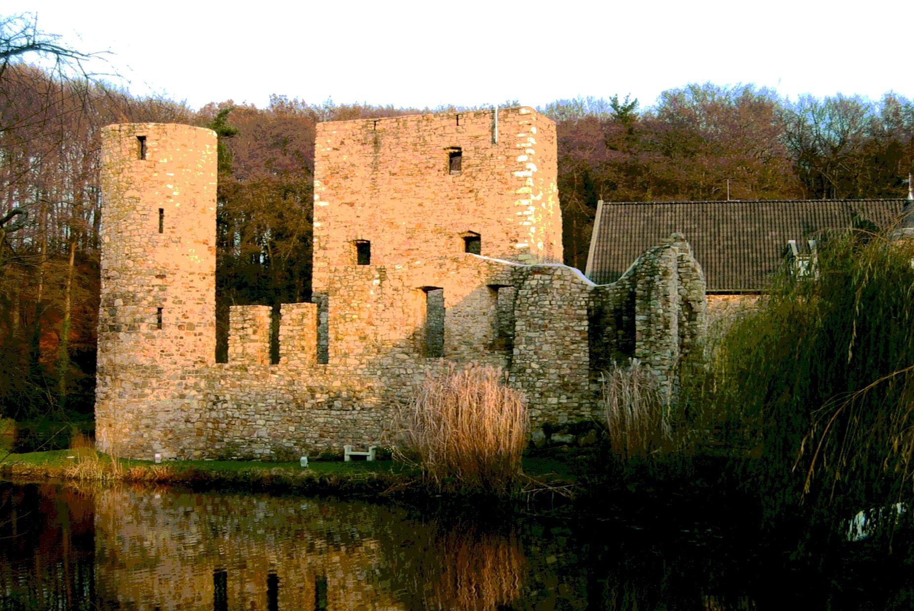 Haus Heyden - Ruine der Hochburg nach der umfangreichen Restaurierung in den Jahren 2002/2003, Blick auf die Westseite der Ruine der Hochburg